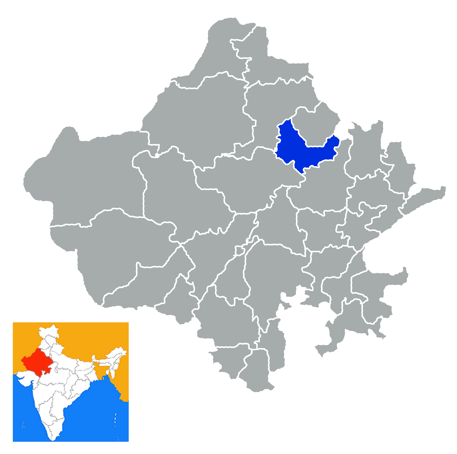 Dikstrito de Sikar Rajastan India